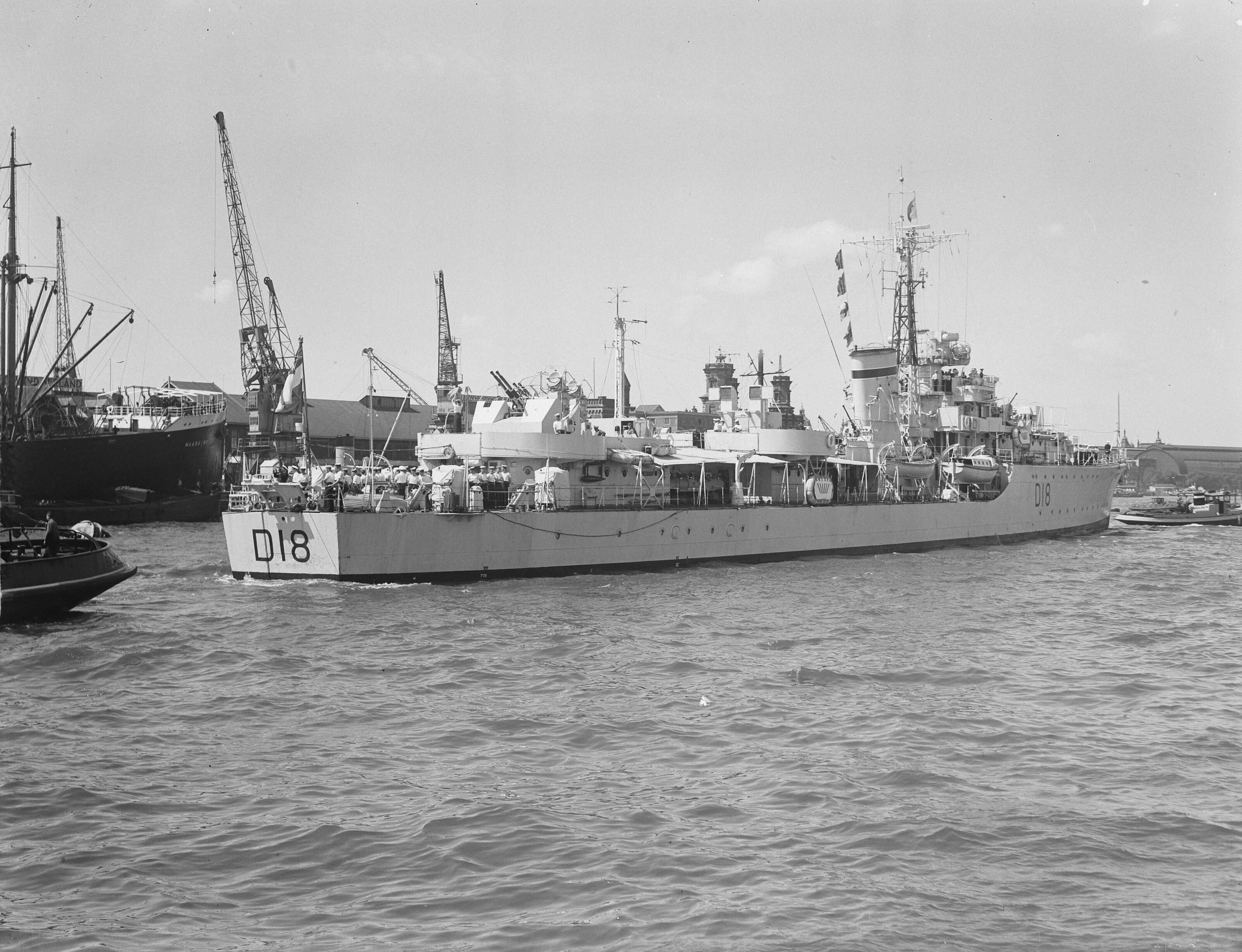 Collectie / Archief : Fotocollectie Anefo Reportage / Serie : [ onbekend ] Beschrijving : Britse torpedoboot jam St Kitts vooruit Datum : 15 juli 1950 Trefwoorden : torpedoboten Fotograaf : Oorschot, […] van / Anefo Auteursrechthebbende : Nationaal Archief Materiaalsoort : Glasnegatief Nummer archiefinventaris : bekijk toegang 2.24.01.09 Bestanddeelnummer : 904-0760